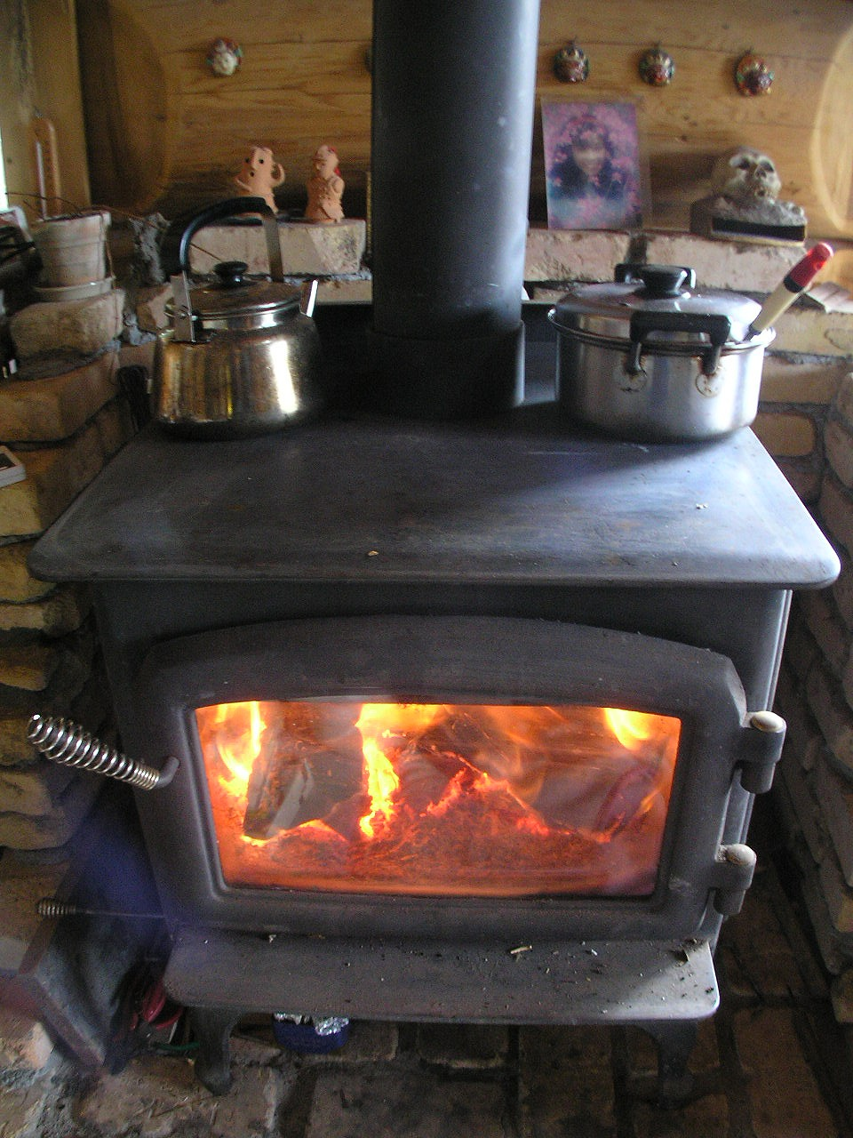 薪ストーブregency